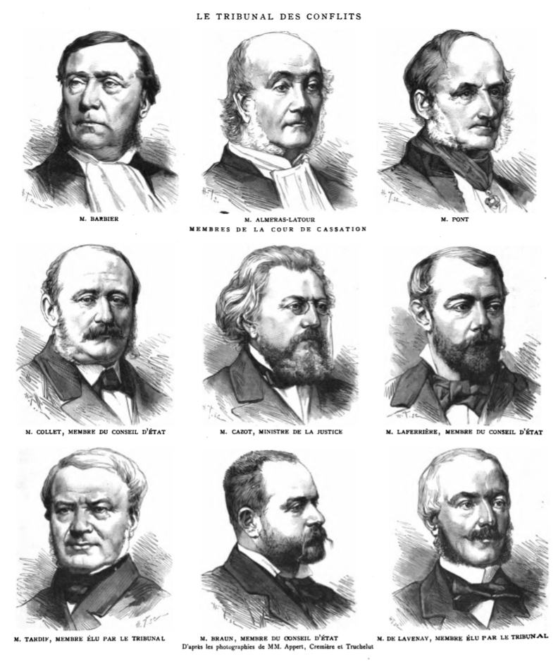 Membres du tribunal des Conflits appelé à se prononcer sur les juridictions dans l'affaire des expulsions de congrégations, en novembre 1880.